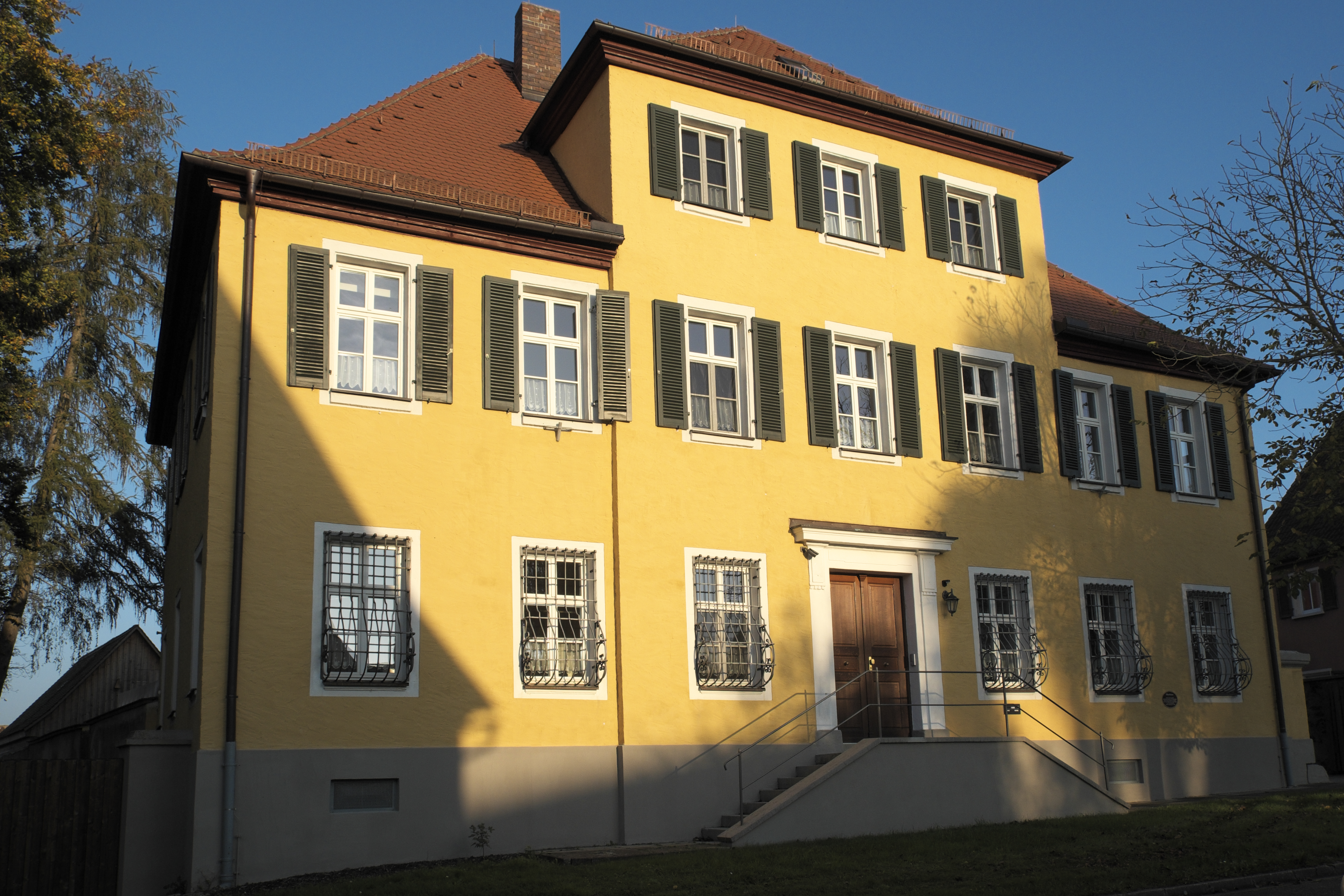 Pfarrhaus in Weiltingen im Landkreis Ansbach (Mittelfranken/Bayern)